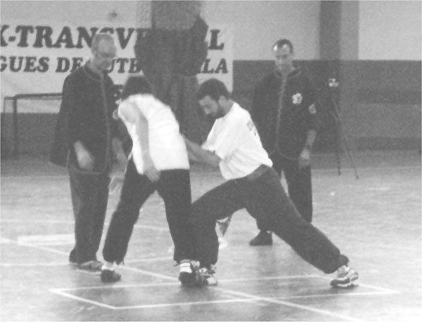 Tui Shou - Associació Catalana de Choy Li Fut, Tai Chi Chuan i Chi Kung